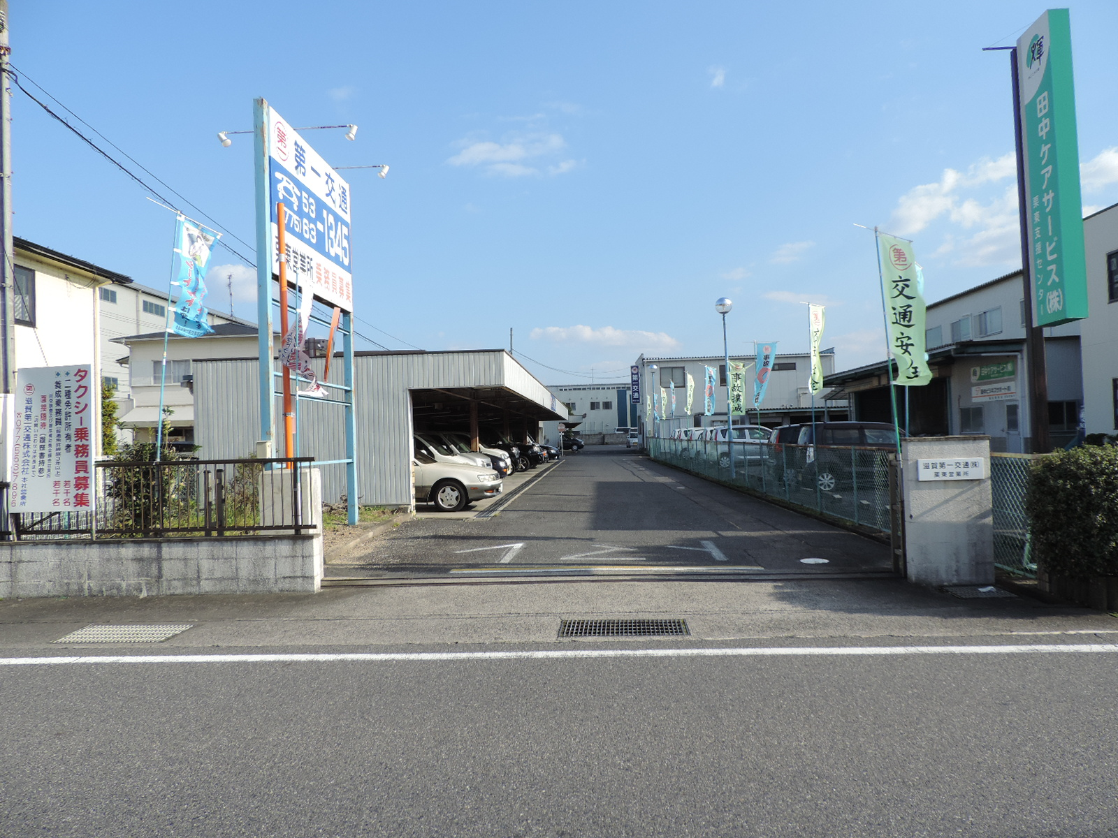 滋賀第一交通本社（栗東市）。2017年撮影